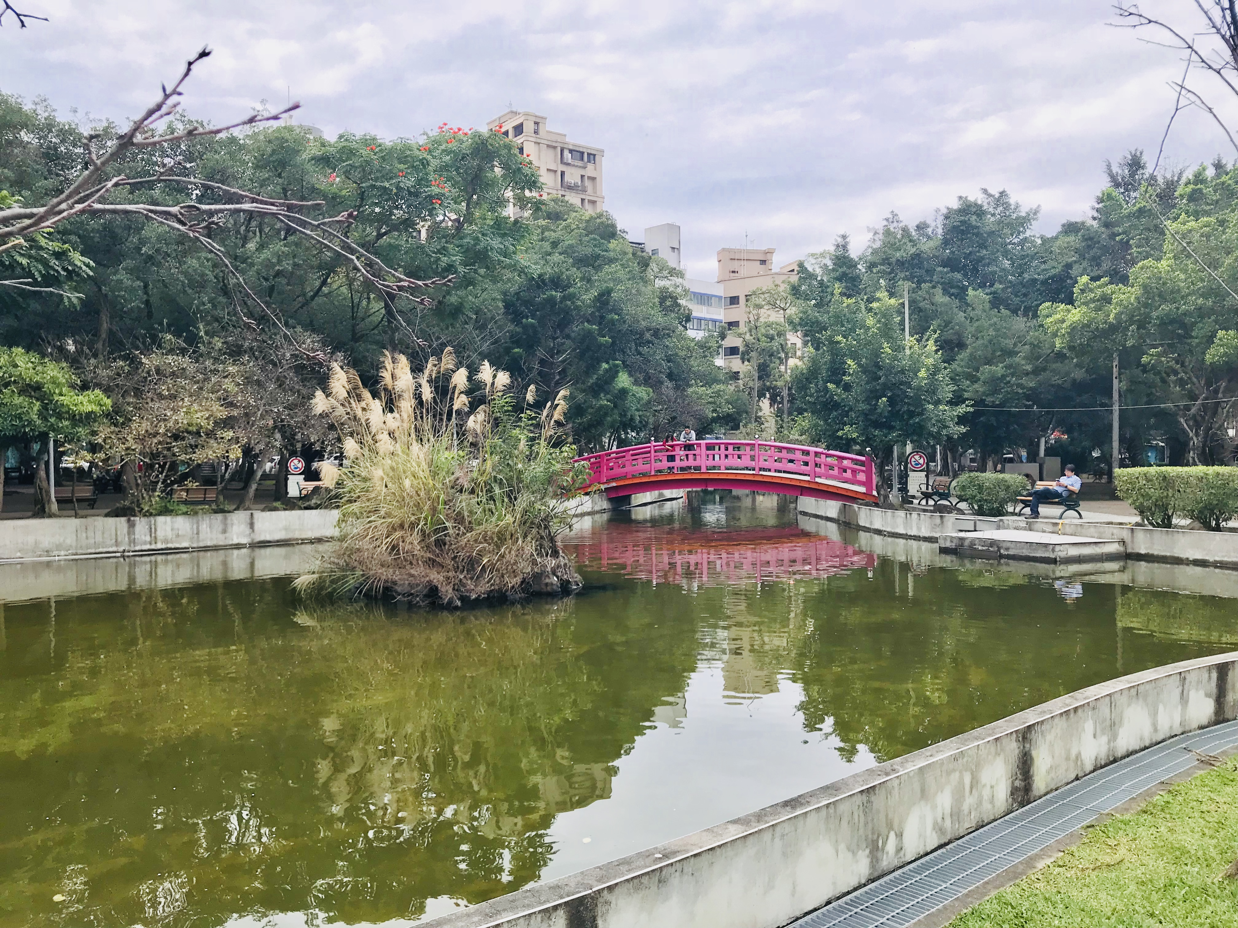 臺北市文山區興隆公園中央的觀景湖